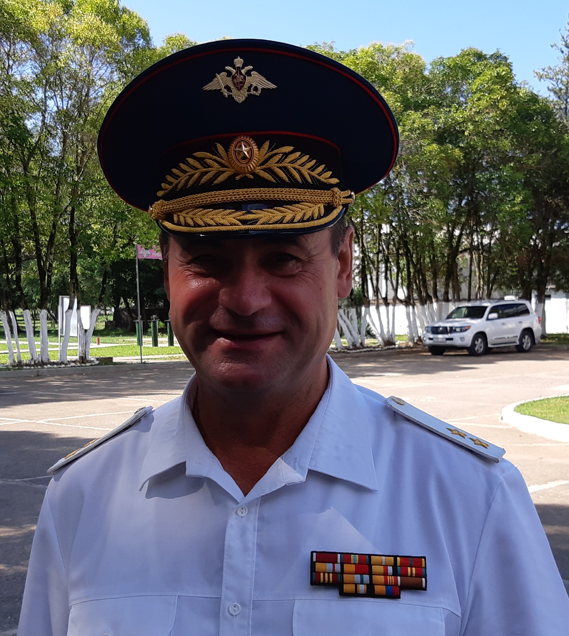 Александр Владимирович Романчук Гудаута 2018